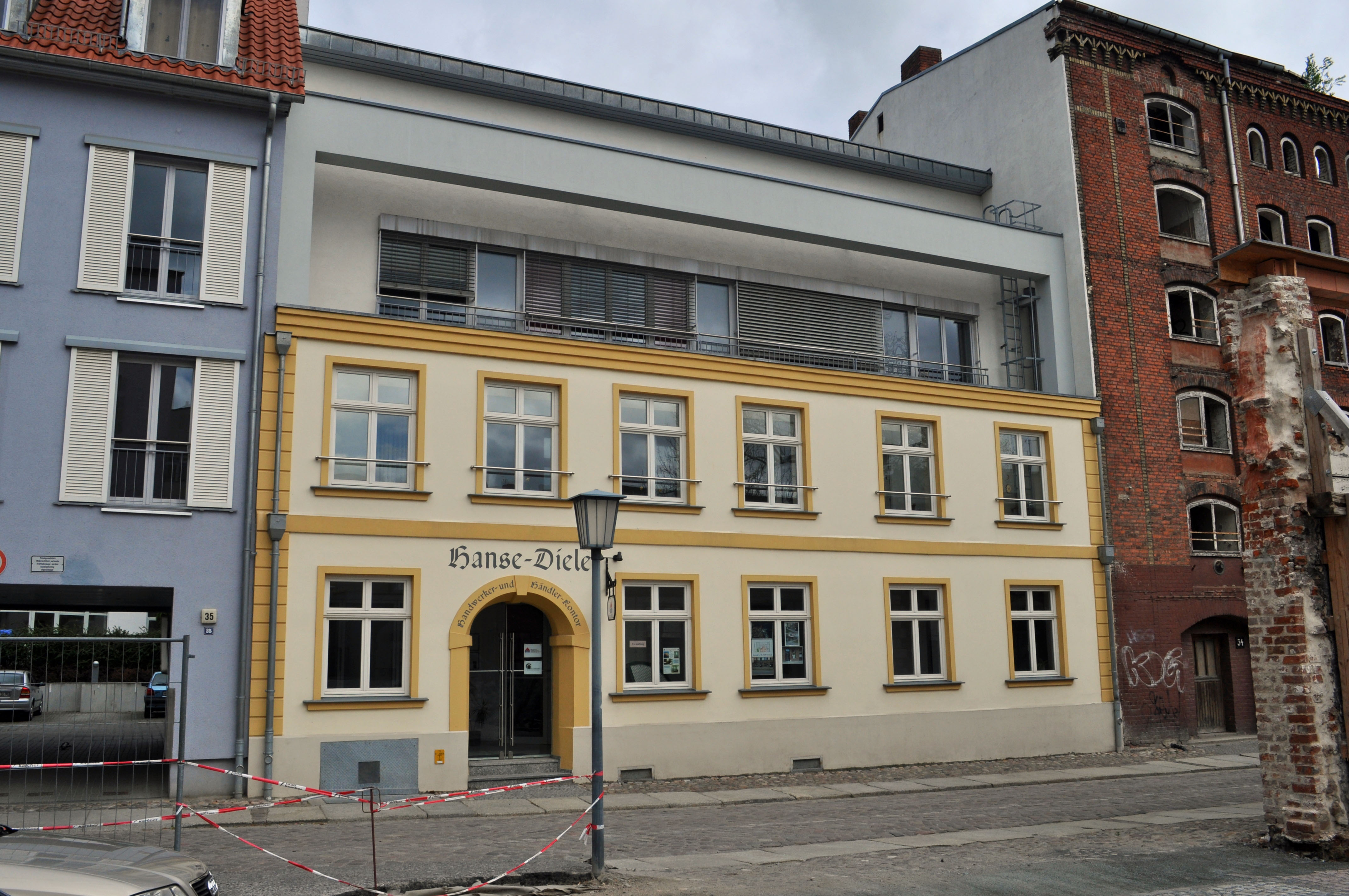 Gebäude in Stralsund, siehe Dateiname